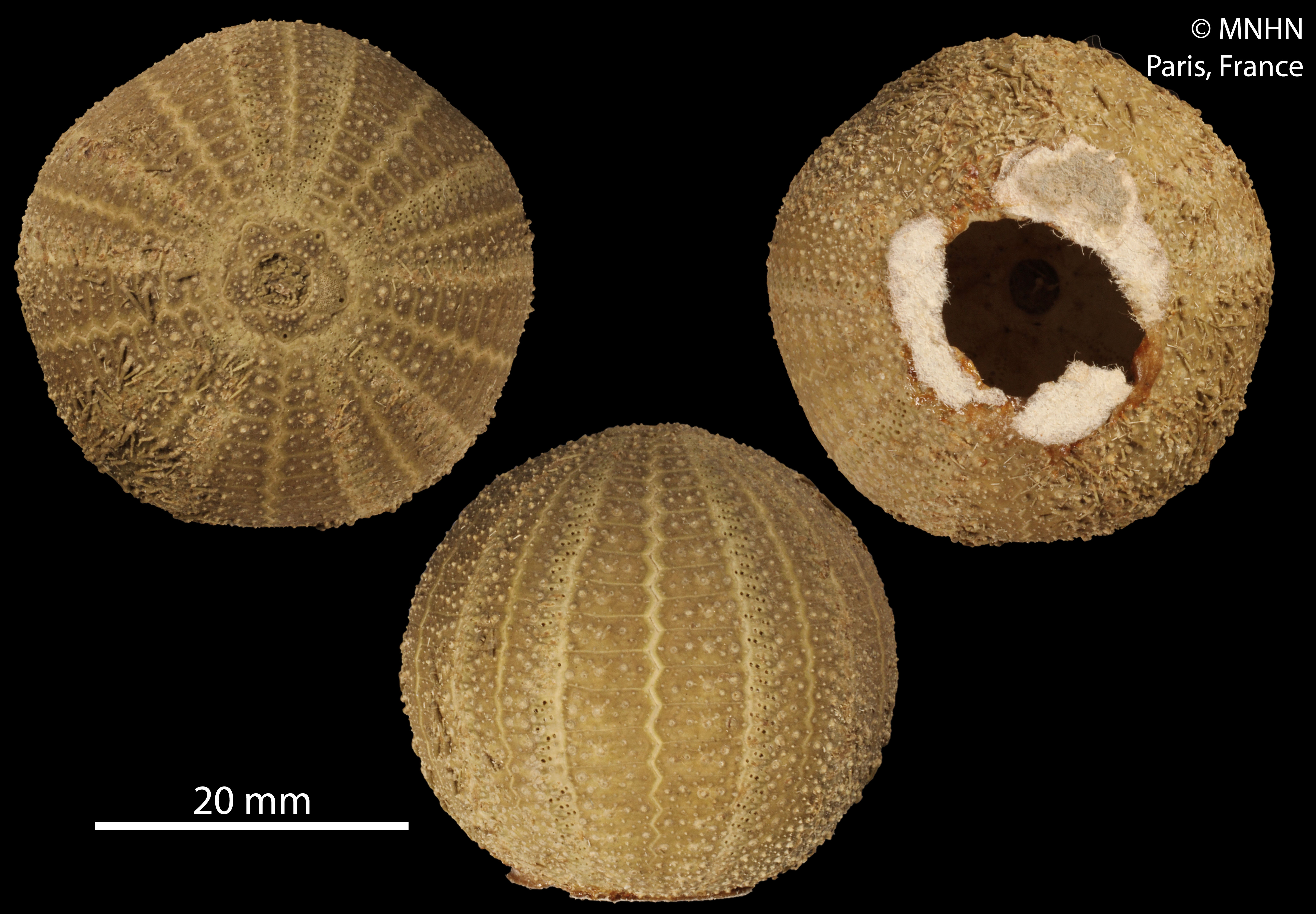 Amblypneustes ovumSpécimen MNHN-IE-2013-10561, sous la dénomination Amblypneustes griseus L. Agassiz, 1846Collection : Échinodermes (IE)Muséum National d'Histoire Naturelle (Paris, France) Origine : Libellé du pays : ILES SANTA CRUZ Localité/Lieu-dit : Vanikoro Nom du collecteur : Quoy & Gaimard Navire : Astrolabe